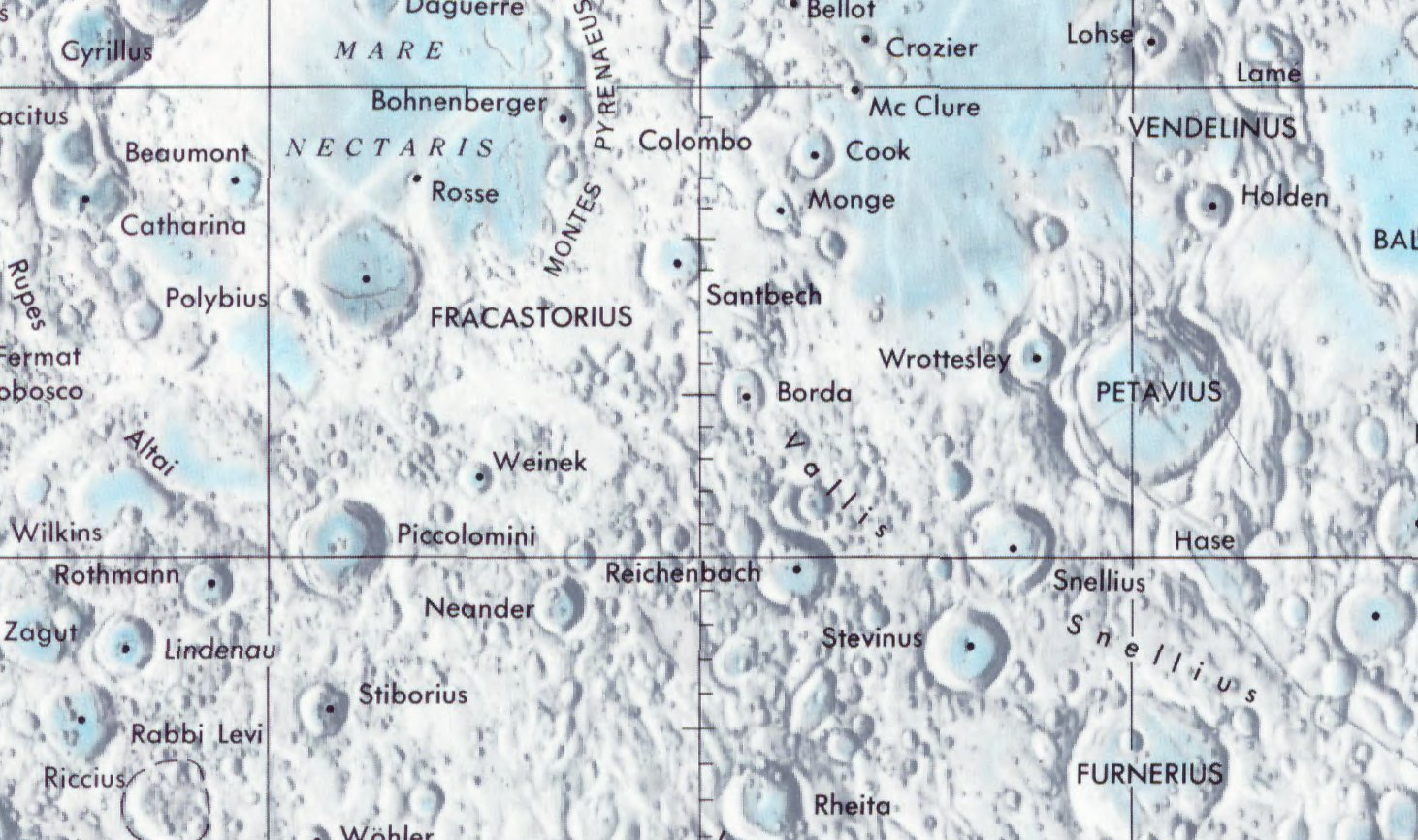 Cráter lunar Borda. Localización. (Lunar Chart LPC1. Second Edition)